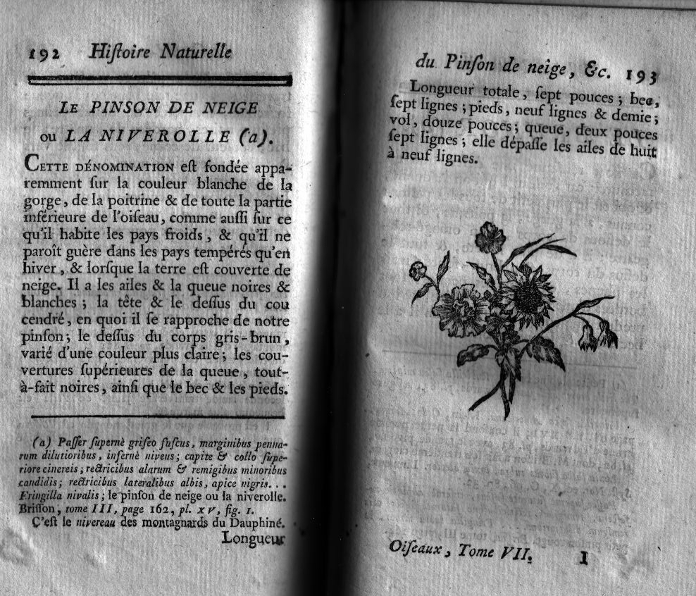 Description du « pinson de neige » ou « niverolle » dans L’Histoire Naturelle des Oiseaux, tome VII (1779) de Buffon.